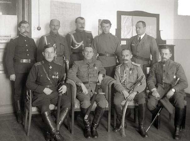 Екатеринбург во время гражданской войны. Штаб Сибирской армии; (слева направо) в нижнем ряду Гайда, Колчак, Богословский. Февраль 1919